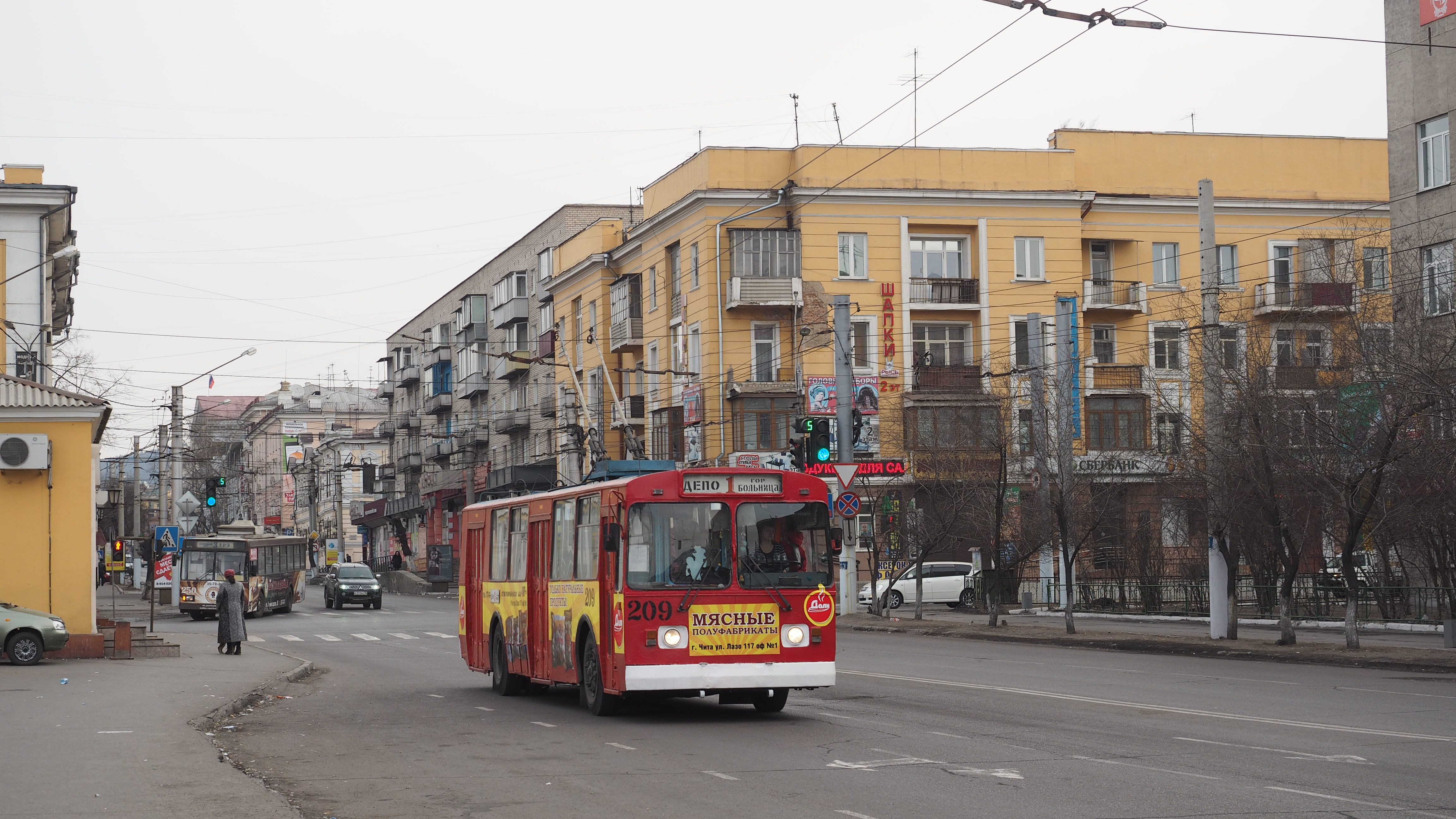 Читинский троллейбус